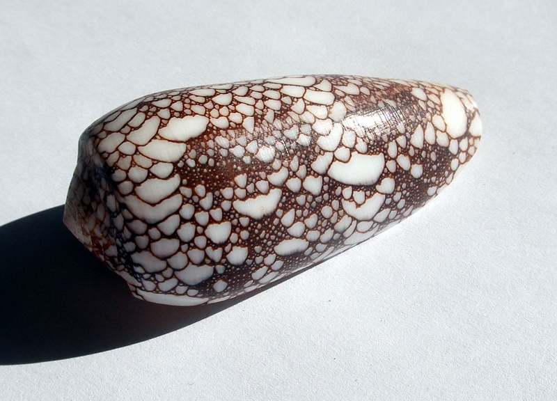 Conus omaria